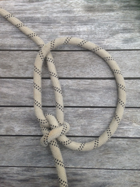 noeud après retournement